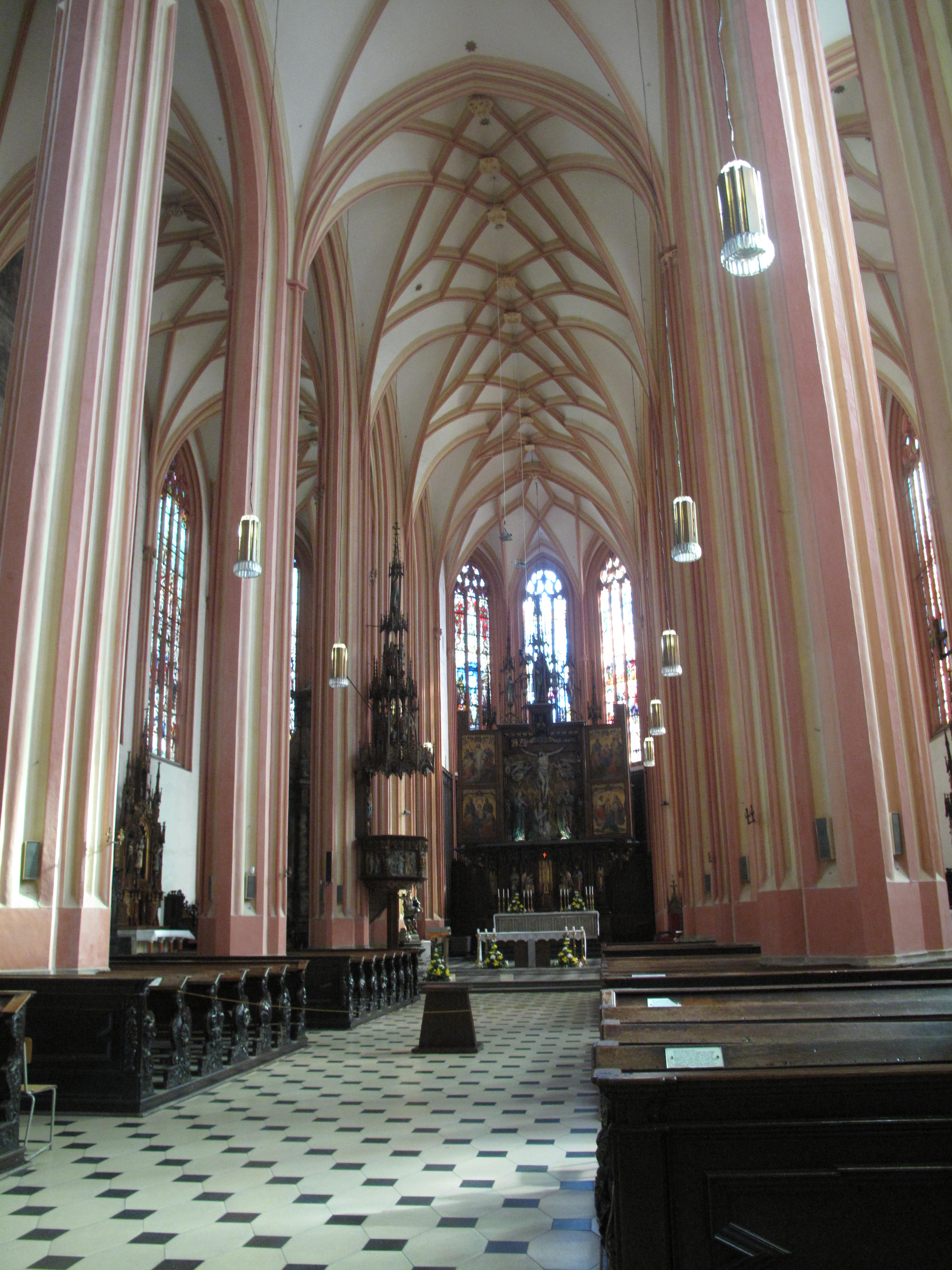 Olomouc